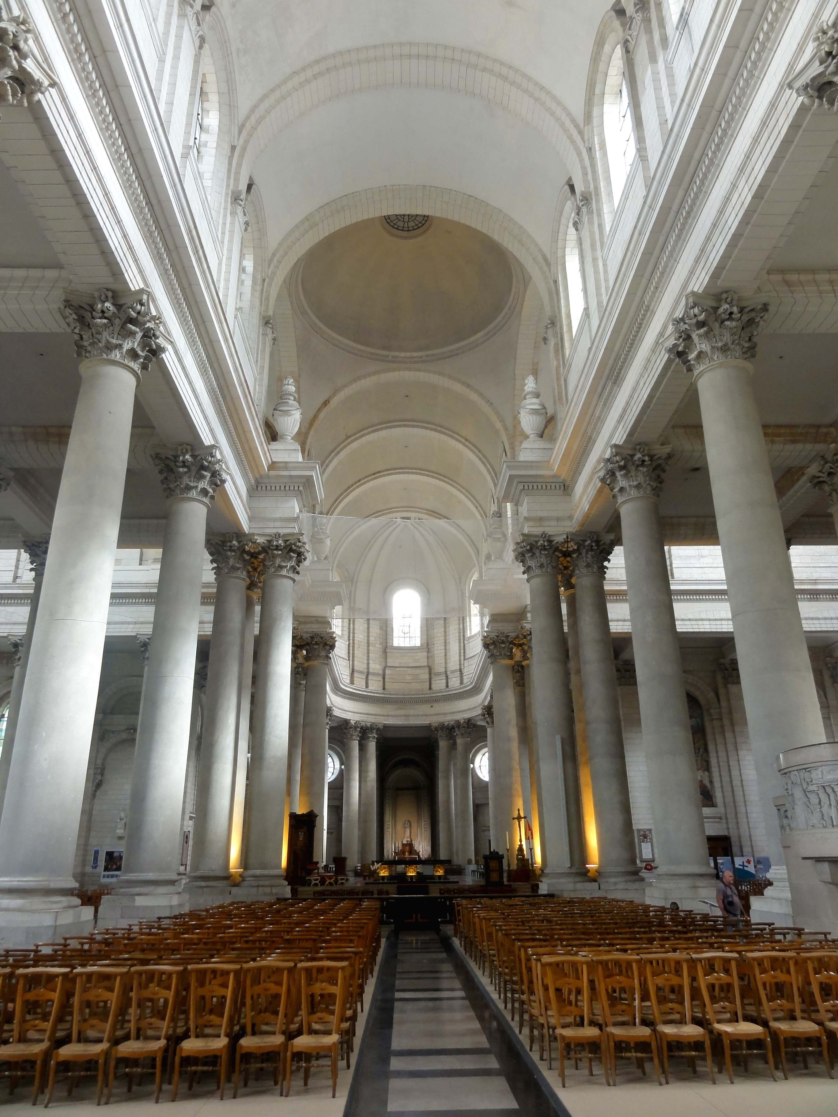 Intérieur de la cathédrale - voir le titre du fichier.